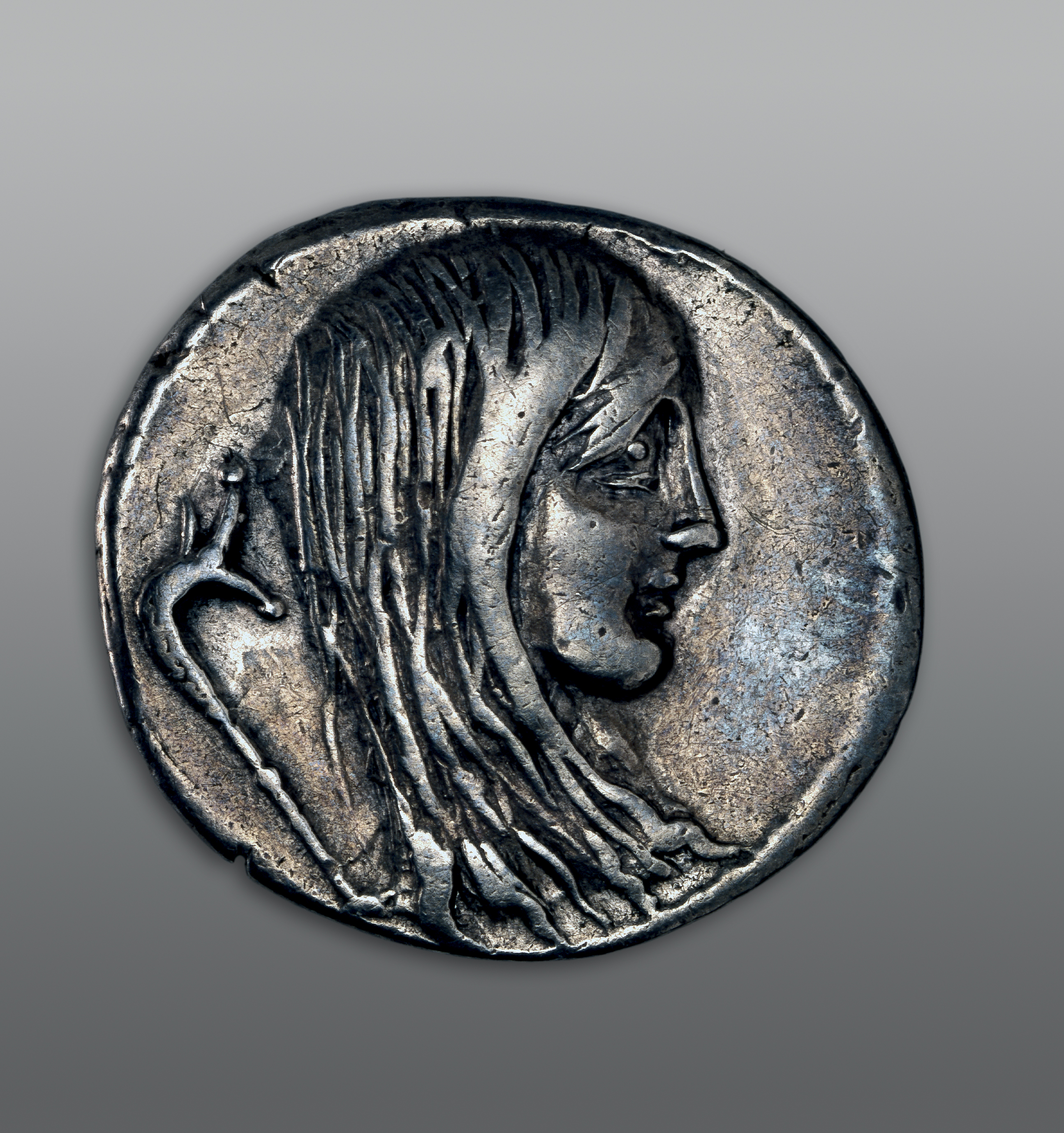 Münze einer langhaarigen Gallierin, 48 v. Chr., Silber geprägt, Münzmeister L. Hostilius Saserna im Historischen Museum Basel